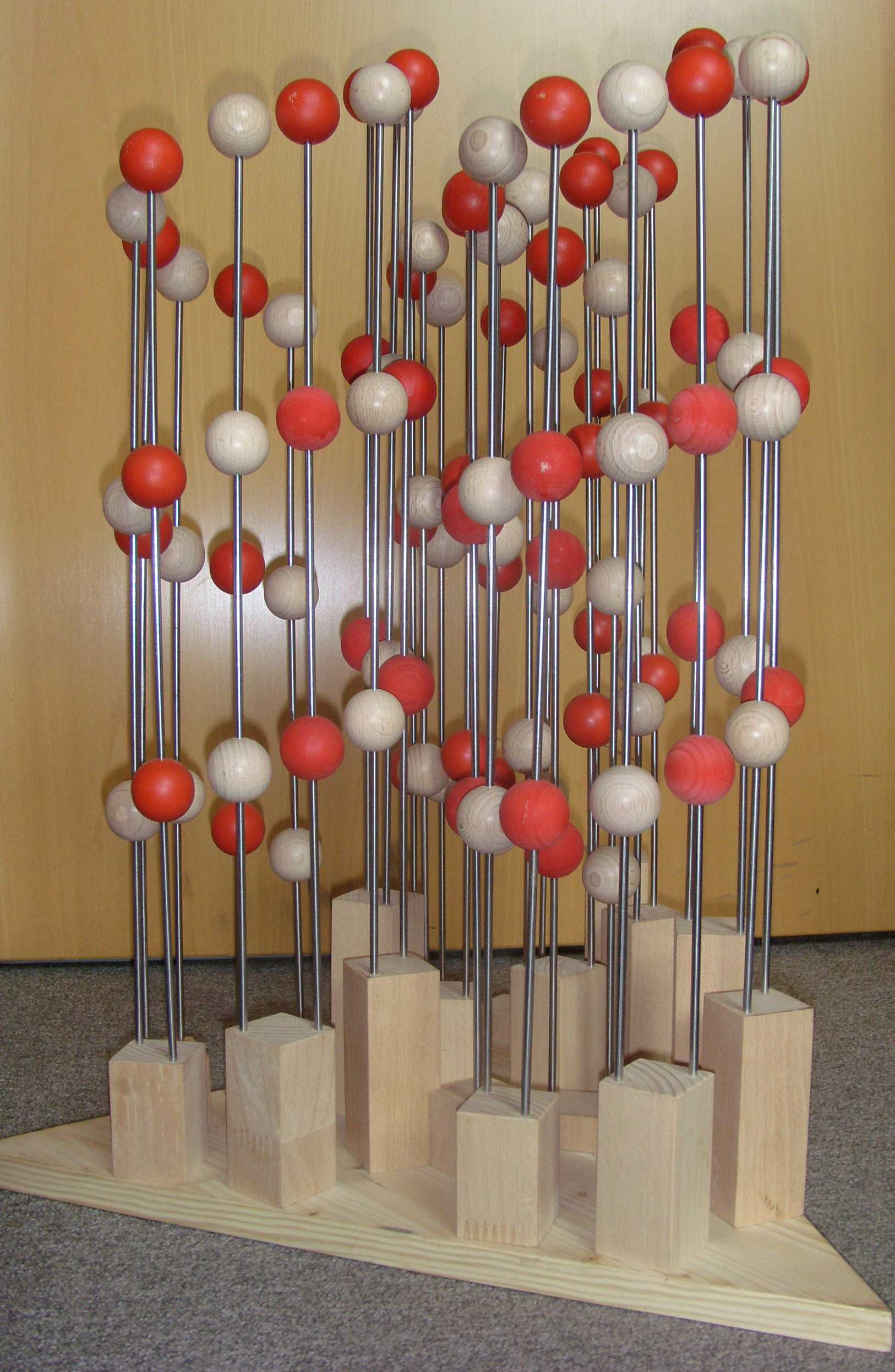 Nachbau des Demonstrationsmodells von Sohncke zur Veranschaulichung der "chiralen" Raumgruppen durch die Werkstatt der Physikalisch-Astronomischen Fakultät der Friedrich-Schiller-Universität Jena, 2009